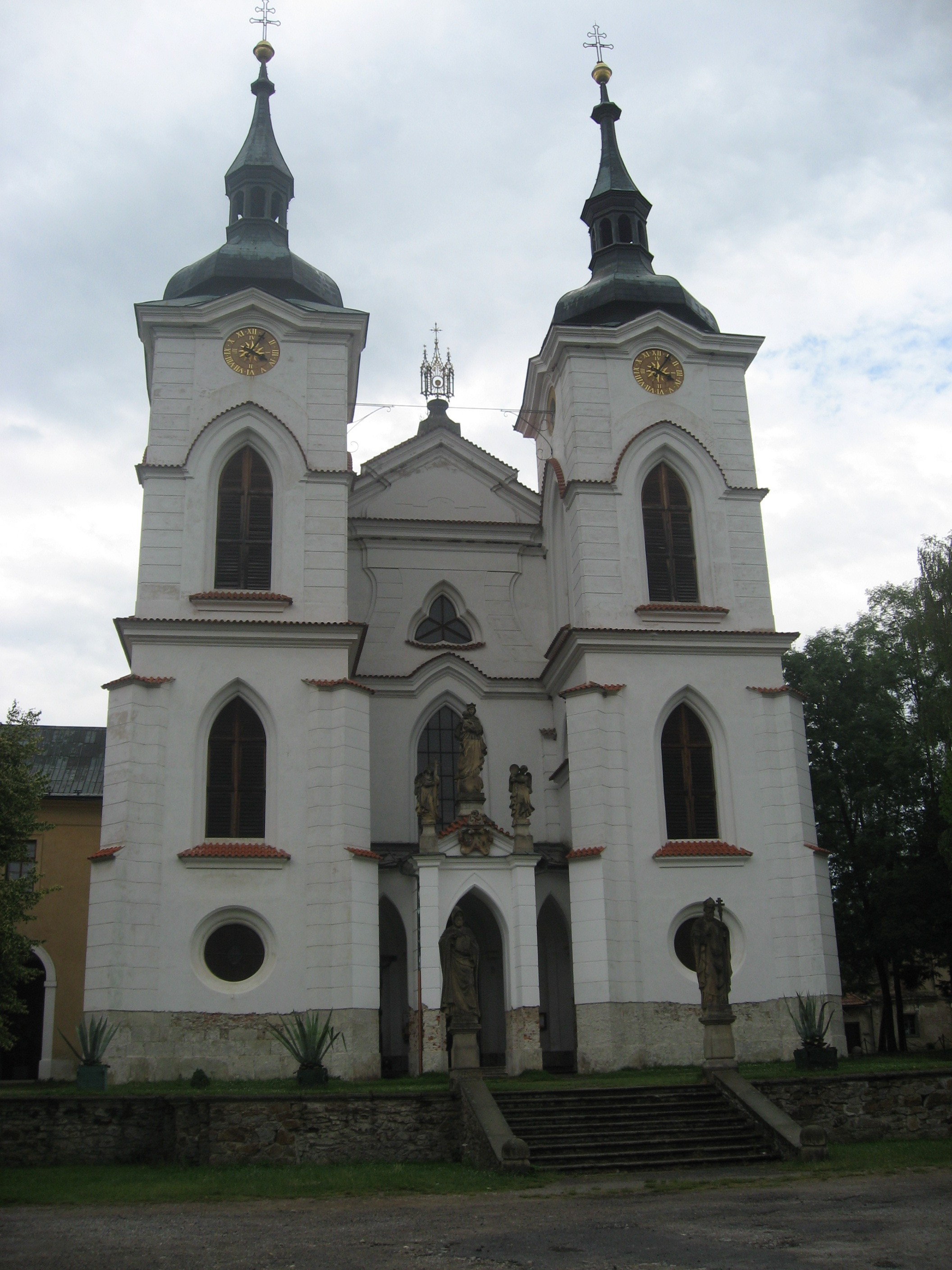 Želivský klášter - Kostel Narození Panny Marie